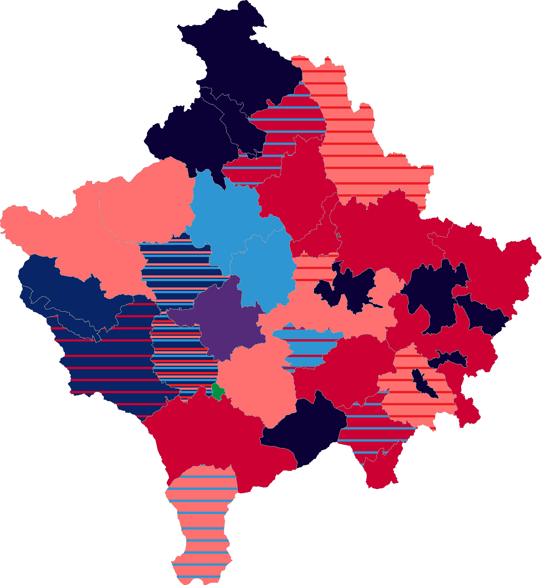 Carte du Kosovo pour les élections de 2019